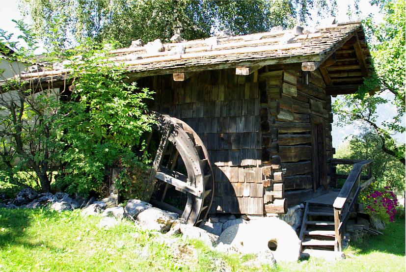 Mühle